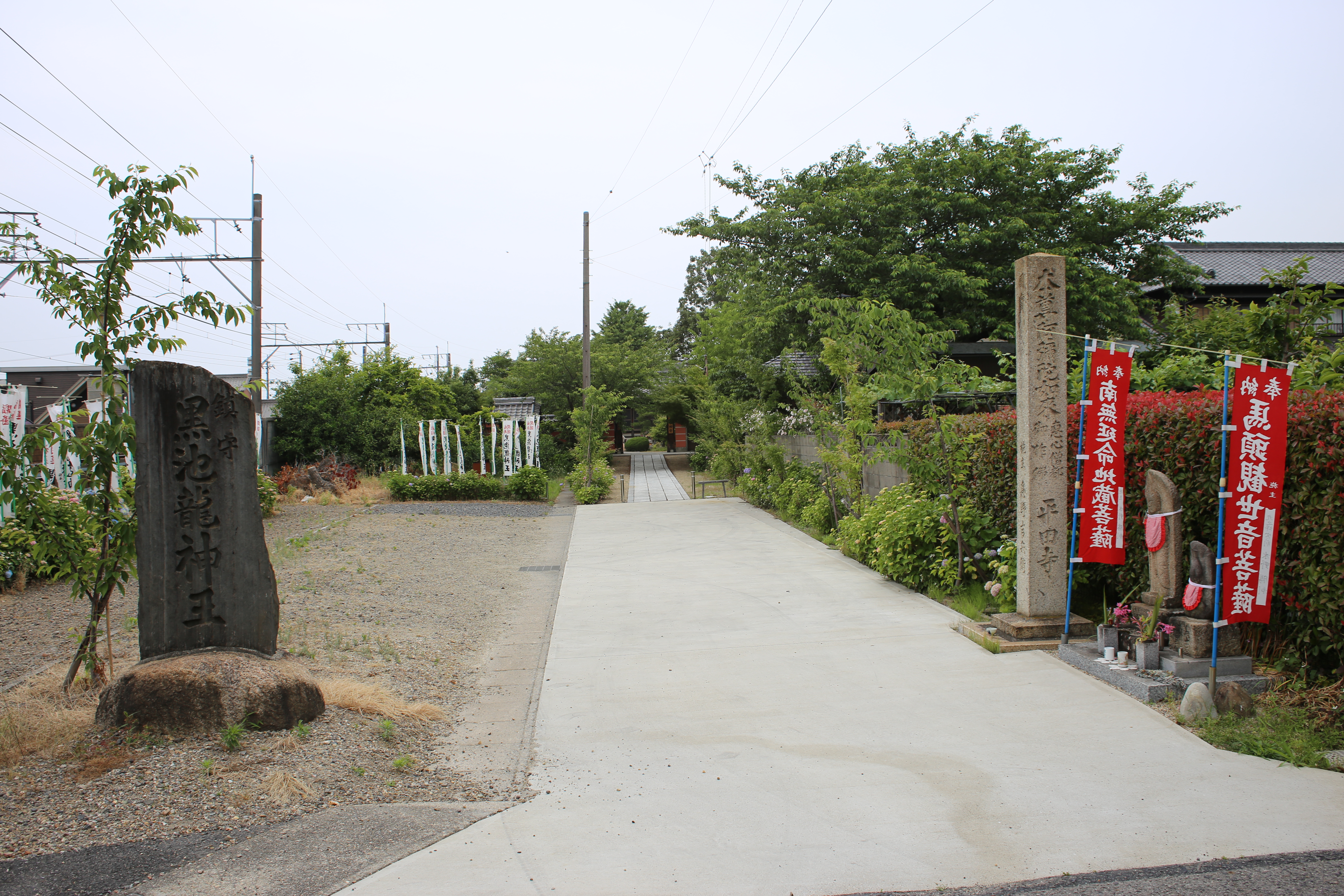 愛知県北名古屋市九之坪宮前の曹洞宗大雲山平田寺を南側公道西側より撮影